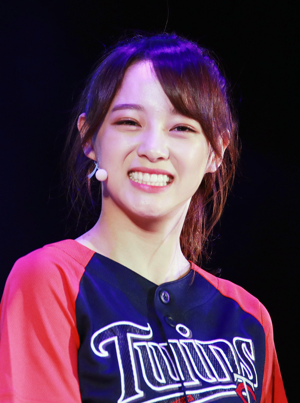 160429 아이오아이 (IOI) 롯데월드 나이트파티 김세정